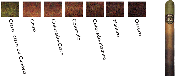 Echelle des principales teintes des Habanos (cigares cubains)